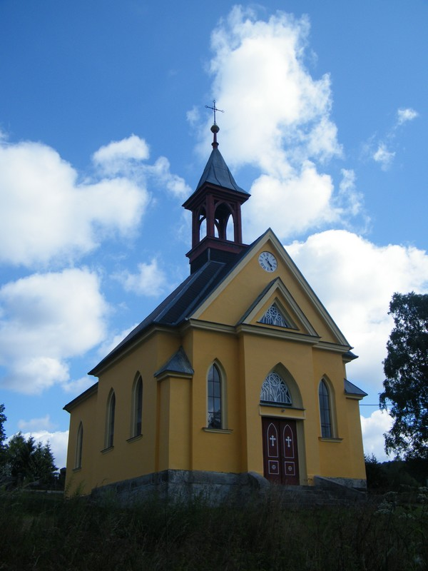 Kaple Panny Marie de Mercede na Marketě